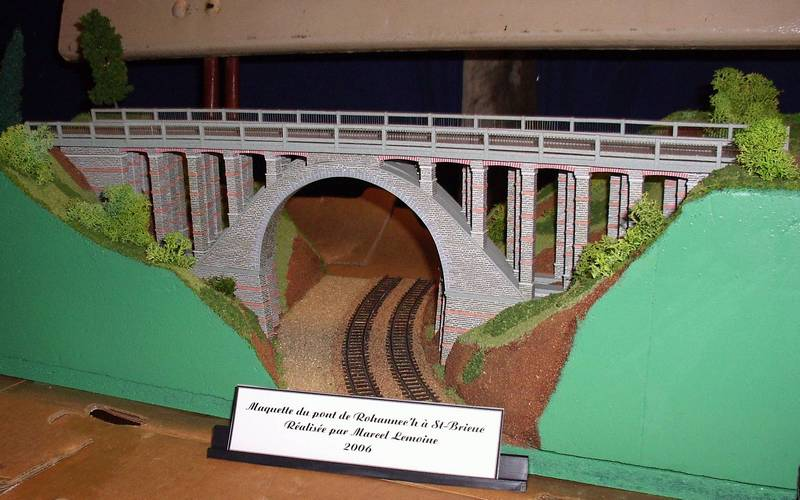 Maquette en HOm du pont de Rohannech sur les Chemins de Fer des Côtes-du-Nord réalisée par M Lemoine